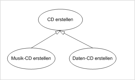 Anwendungsfall (UML2) - Beispiel 1